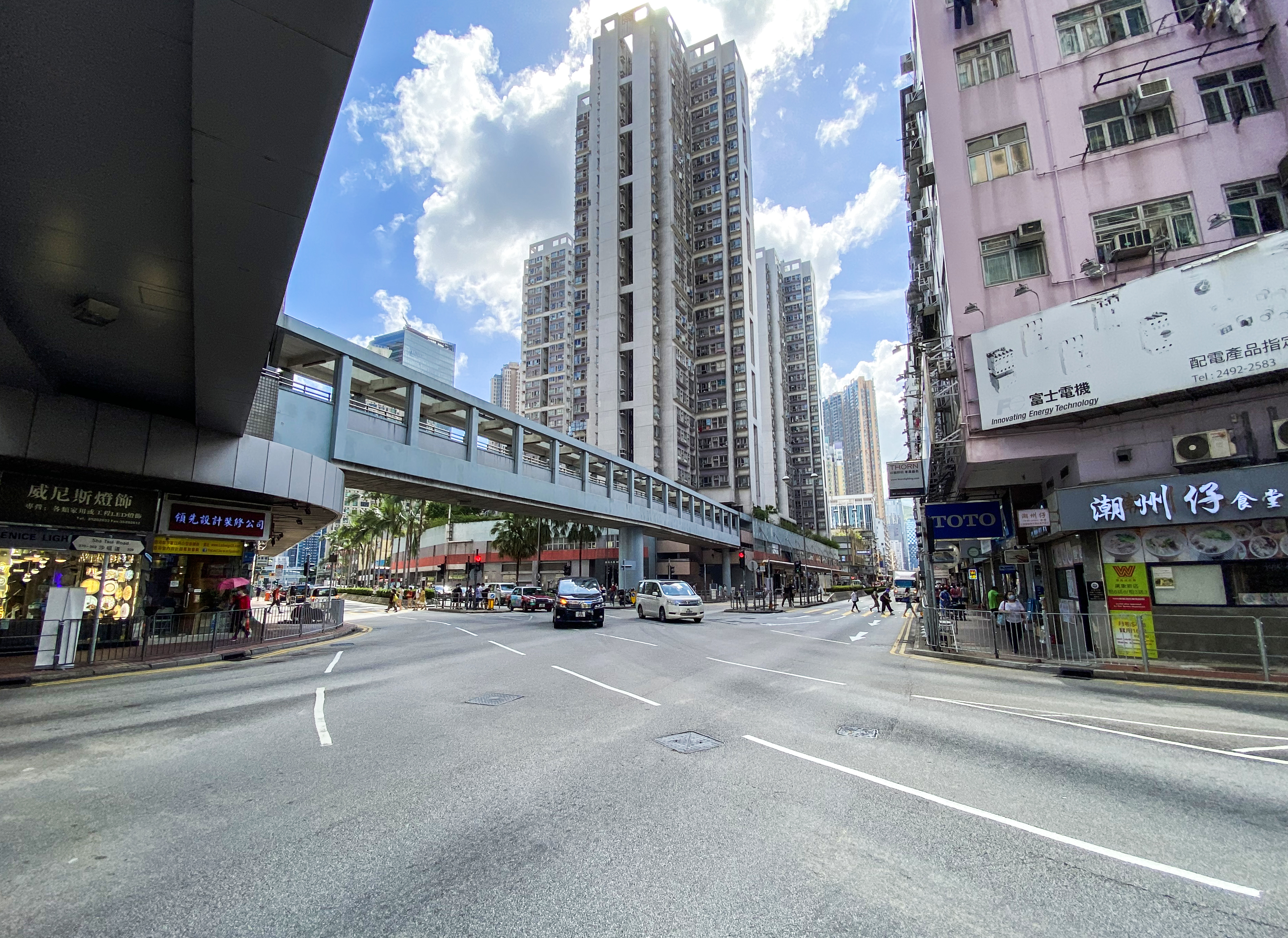 Kwan Mun Hau Street